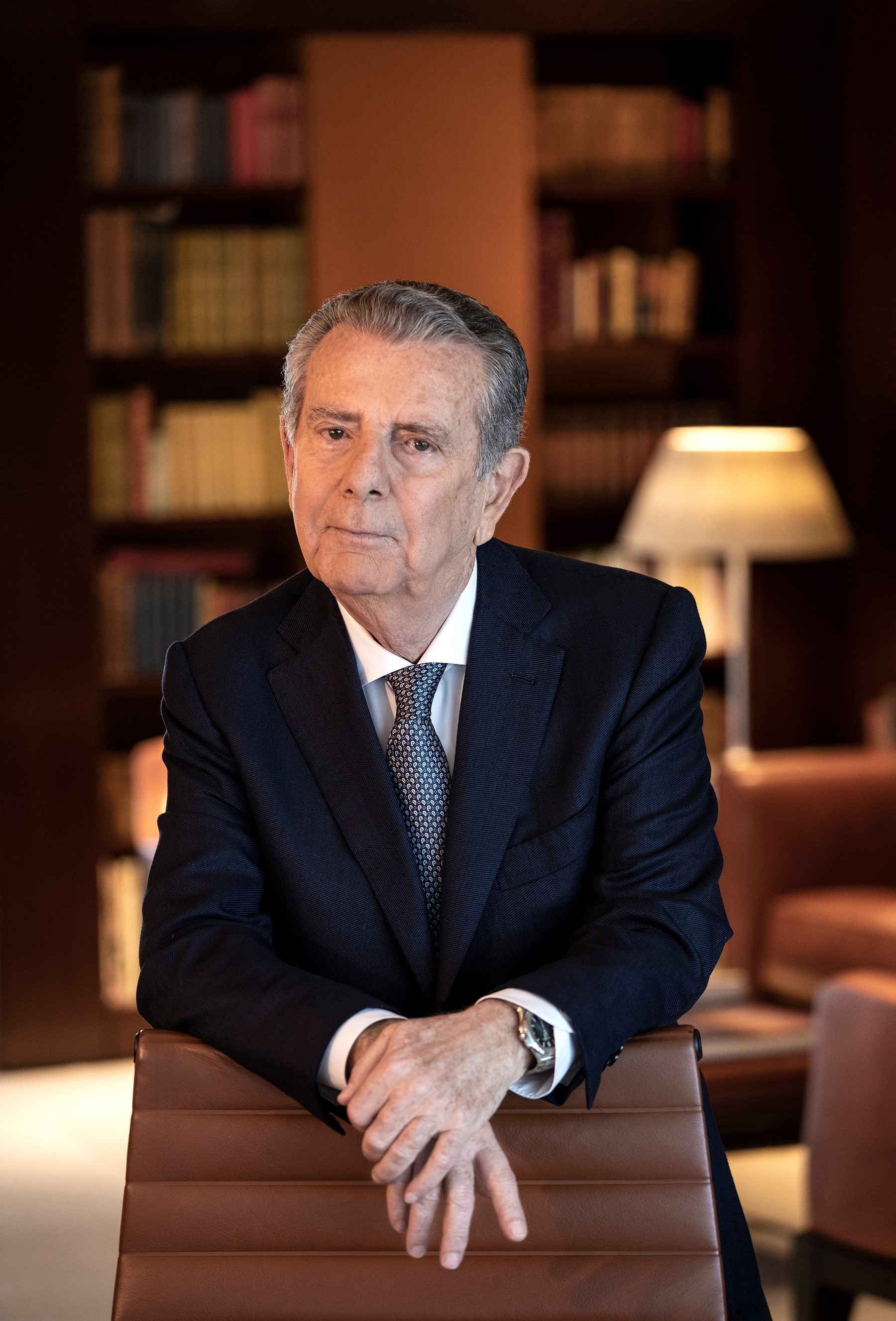 Javier Godó Muntañola, III Conde de Godó y Grande de España, ​​ es un empresario español de los Medios de Comunicación